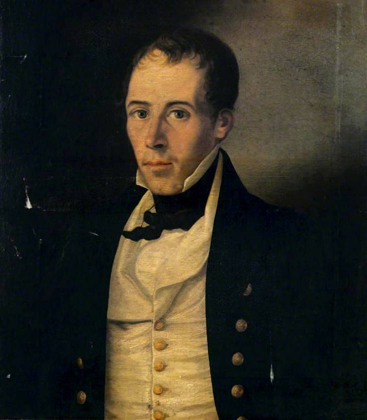 William Jameson, retratado por el pintor quiteño Antonio Salas en 1842. Óleo sobre lienzo.